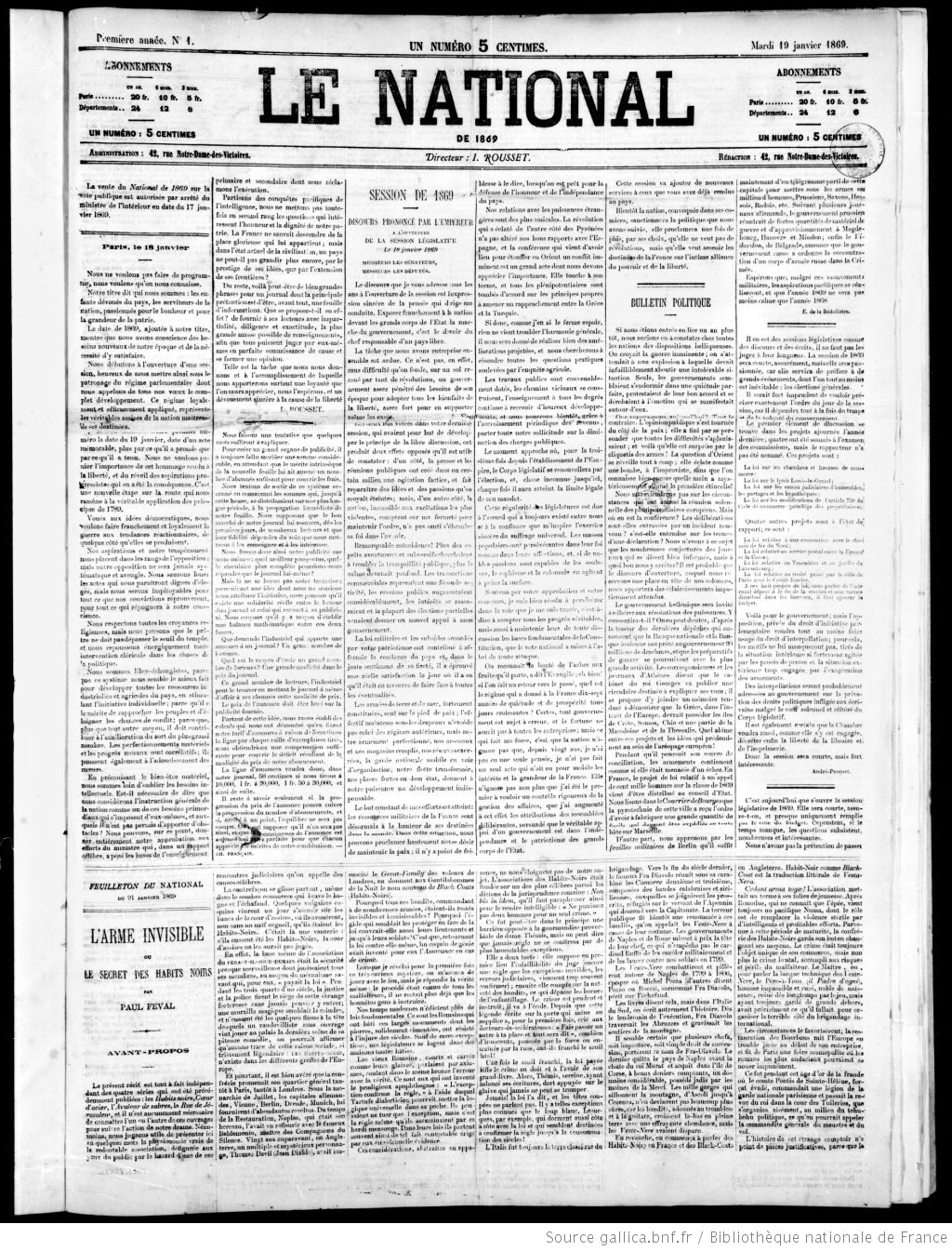 Une du premier numéro du journal Le National, 19/01/1869